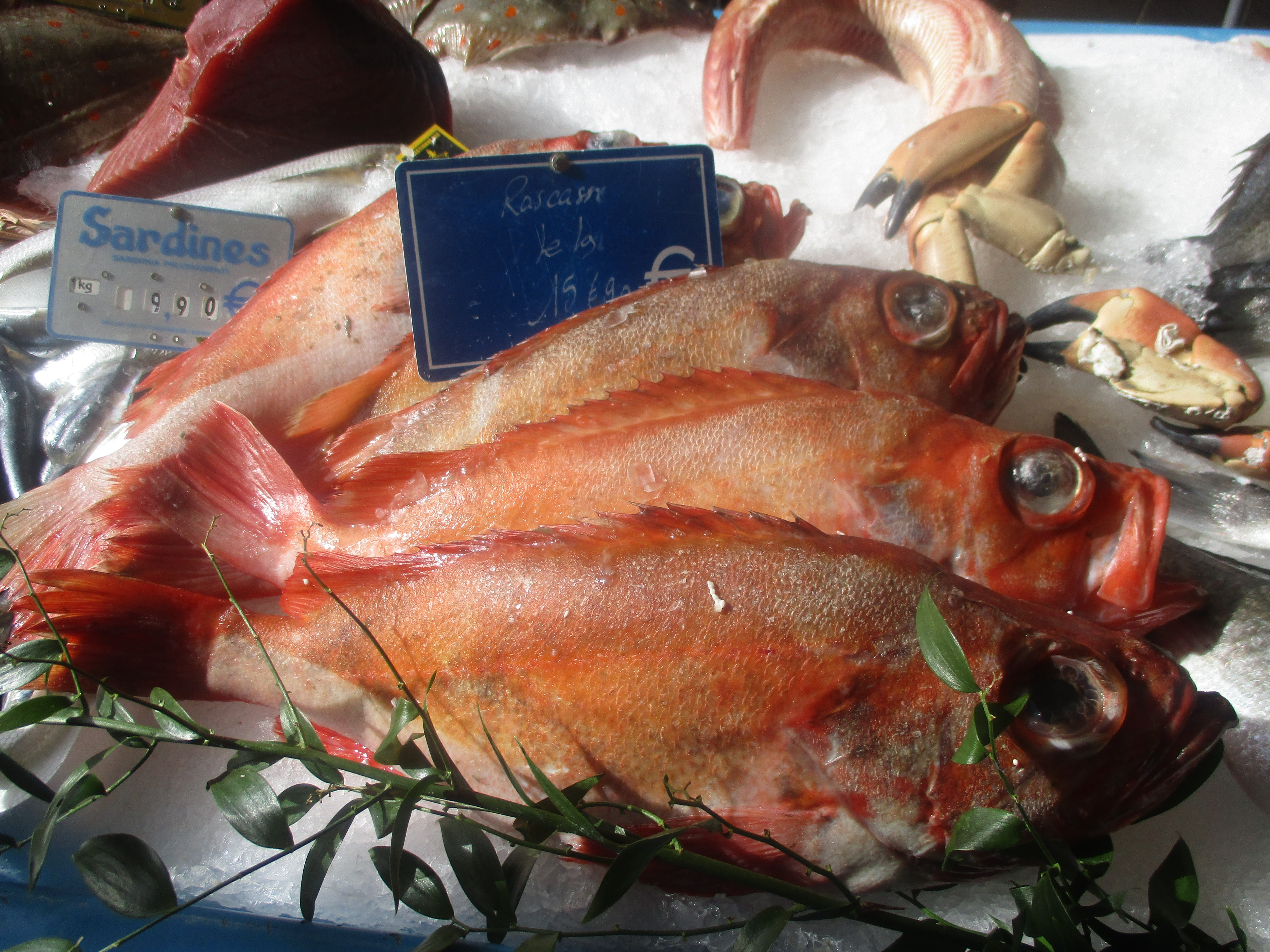 Rascasses au marché de Levallois-Perret.